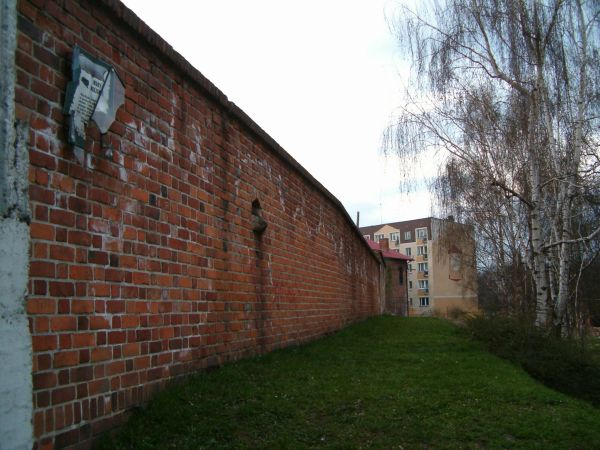 Racibórz, ul. Drzymały - mury obronne (zabytek nr A/1673/749/97 z 17.12.1997)